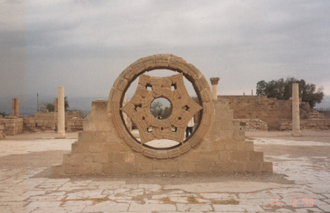 צולם ע"י הגב' אביבה רוסט, שנתנה לי יד חפשית לעשות בתמונותיה ככל העולה על רוחי. אני סרקתי.